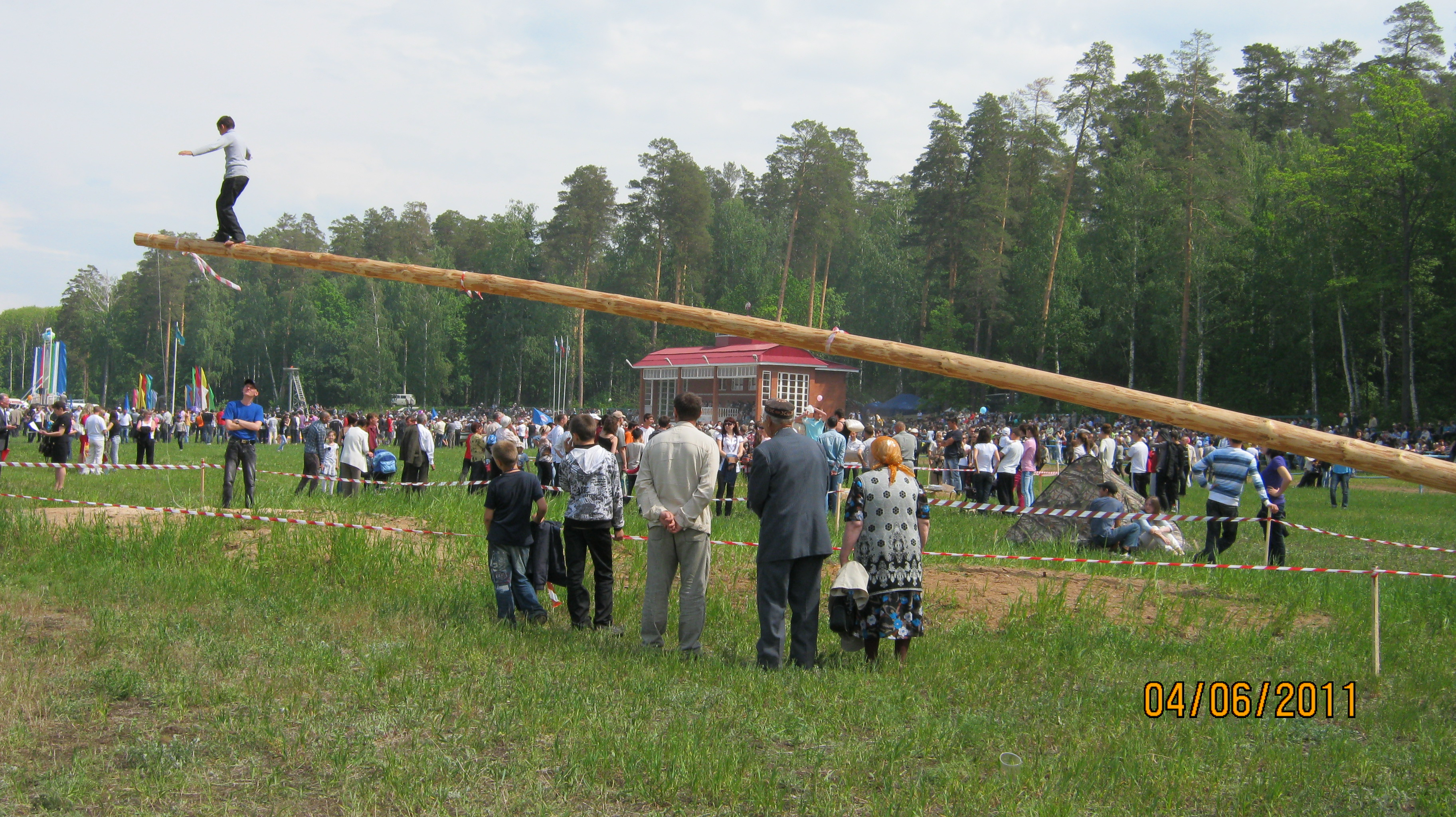 Кыек шиста